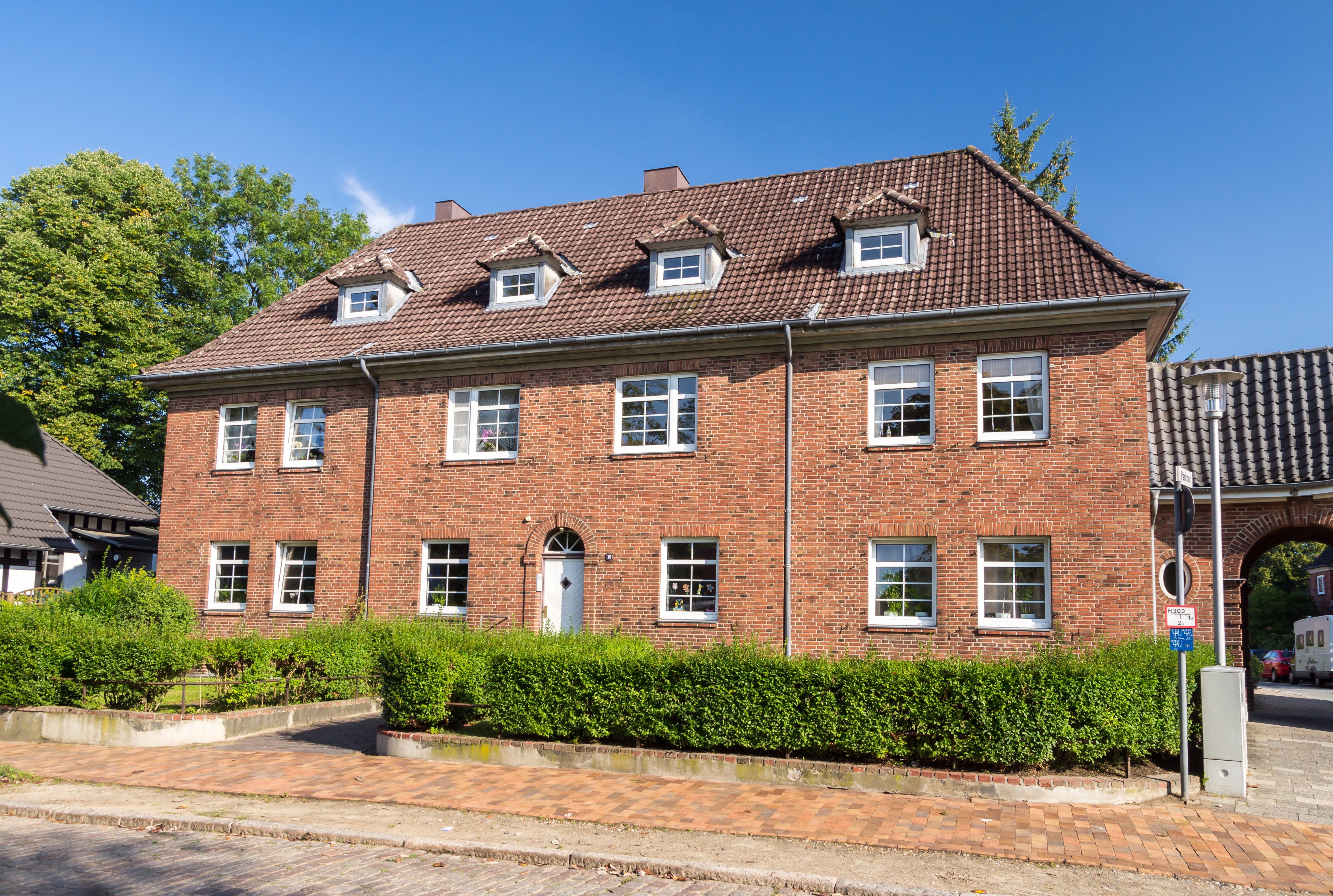 Flensburg-Mürwik, Swinemuender Strasse 10, Wohnhaus, Denkmal-Nr. 26.